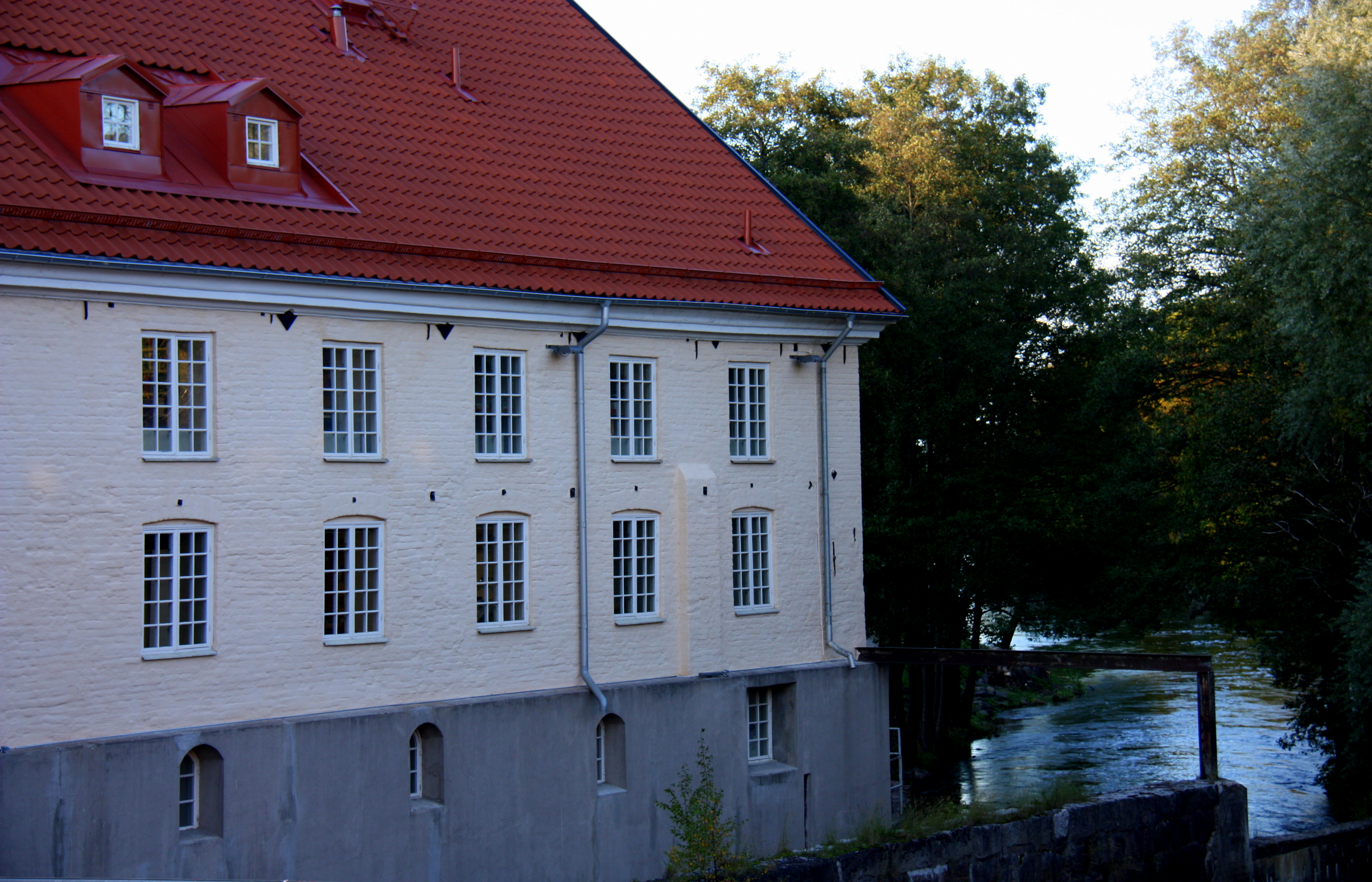 Mjölnaren 1, Torshälla